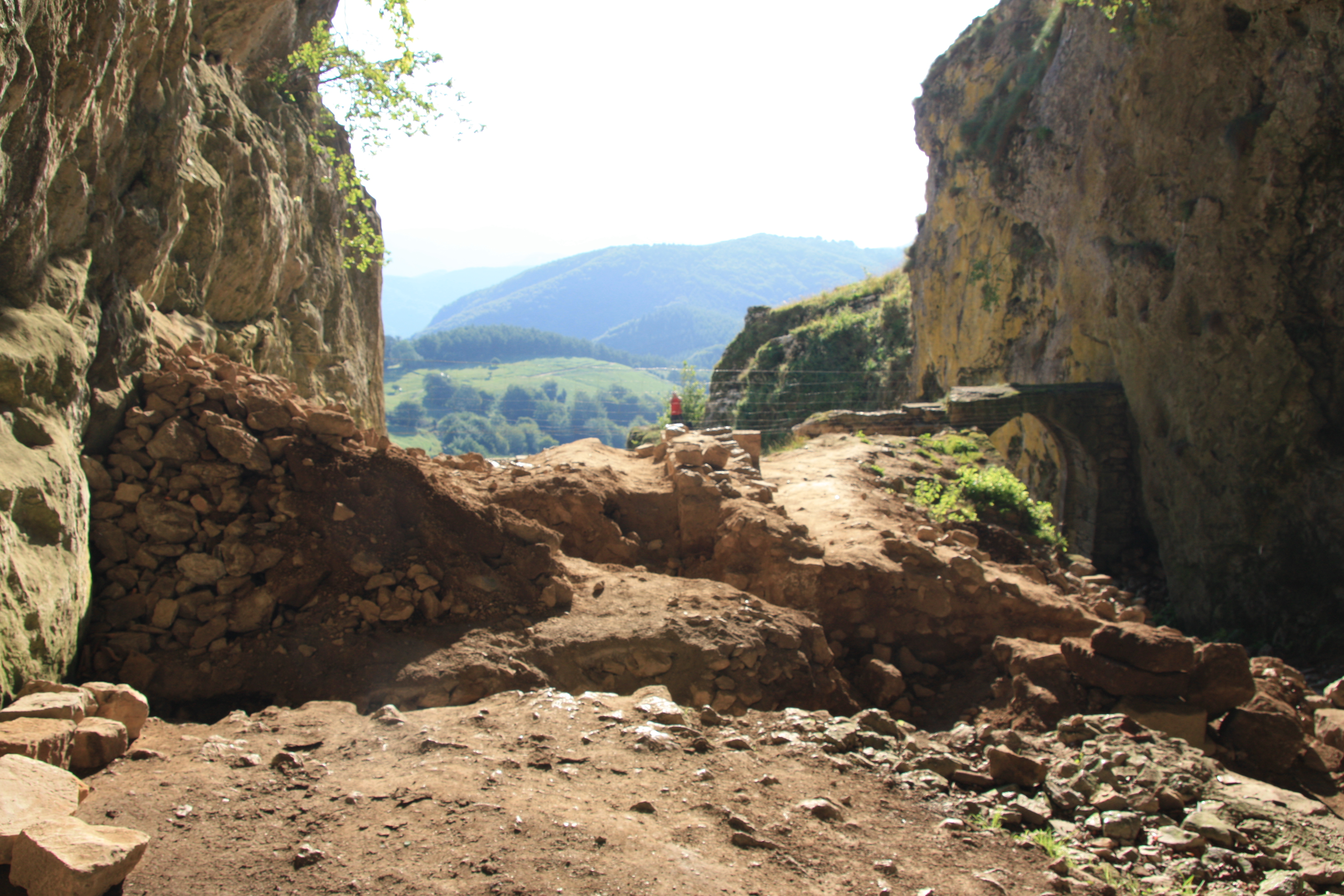 Aranzadi Zientzia Elkartearen indusketa lanak, Lizarrateko tunelean.